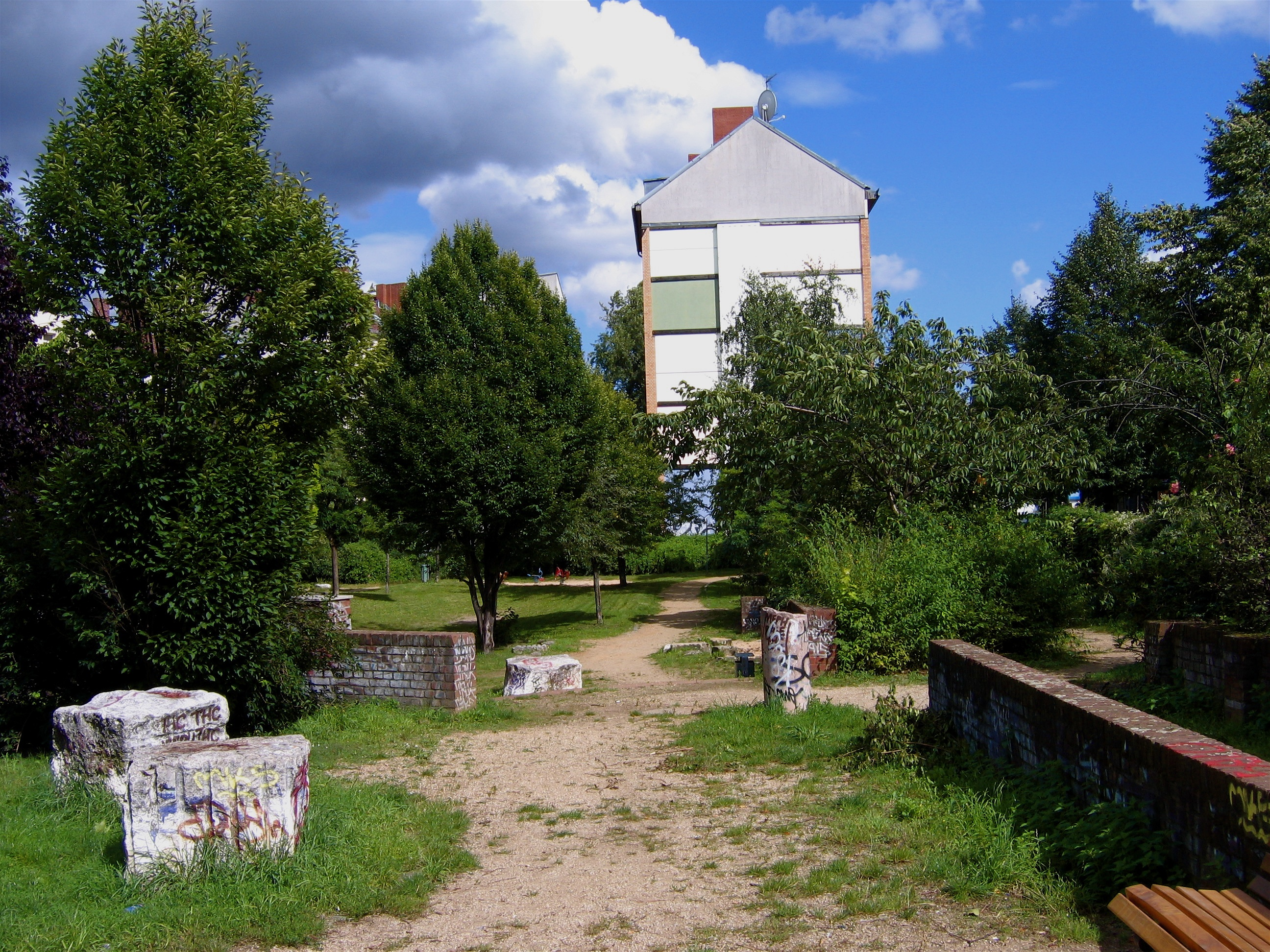 Der Block 104 bezeichnet einen Altbau-Komplex in Berlin-Kreuzberg. Er wurde bis 1981 zur Hälfte zerstört, der Rest blieb durch die Hausbesetzer-Bewegung erhalten. Die Abrissfläche ist heute Park (Nähe U-Görlitzer Bahnhof).